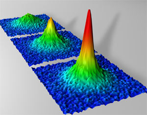 Image venant du National Institute of Standards and Technology, dans le domaine public américain. D'autres images ont déjà été importées venant de cette source, comme par exemple Bose_Einstein_condensate.png.